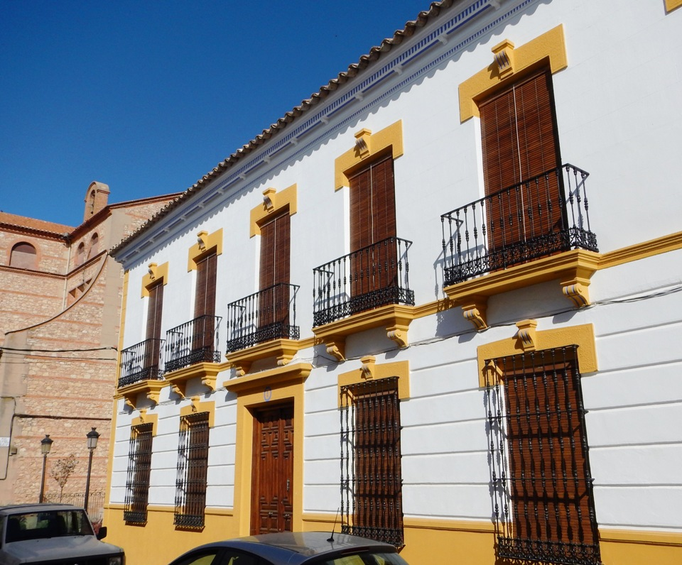 Típica casa solariega en Campo de Criptana. Reflejo de la bonanza económica que vivió la localidad a finales del siglo XIX y principios del XX.